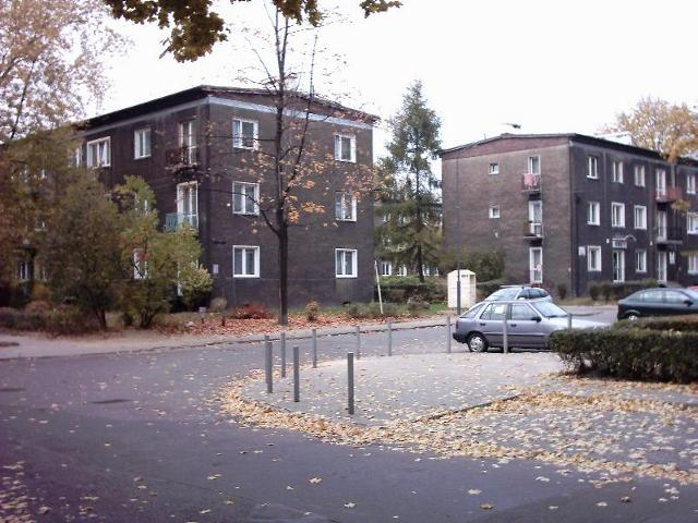 Katowice Koszutka - róg Czerwińskiego i Grażyńskiego,typowa socrealistyczna zabudowa osiedla z lat 50. XX wieku (2005r.) Autor: Medvi